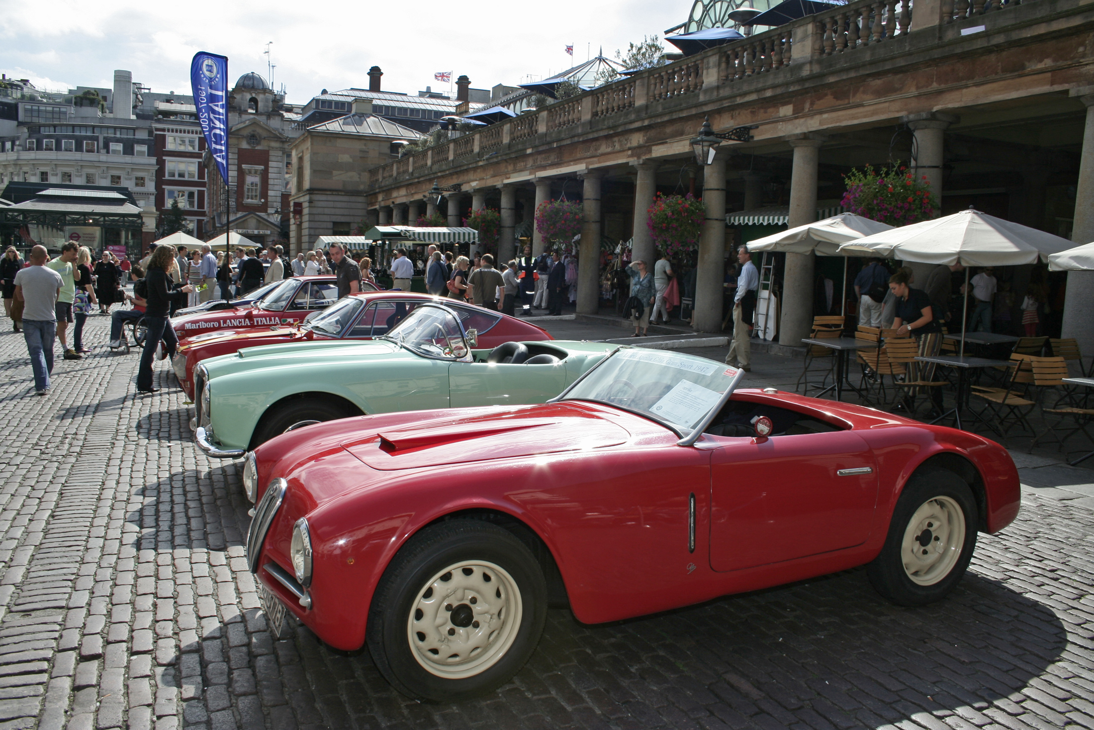 Lancia Aprilia Ghia Gran Sport 1947 Covent Garden london